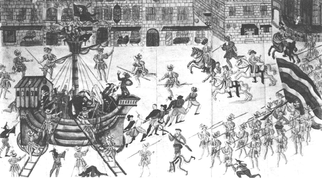 Schembart parade in Nuremberg